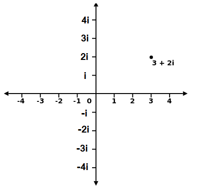 മിശ്രസംഖ്യാ പ്രതലം